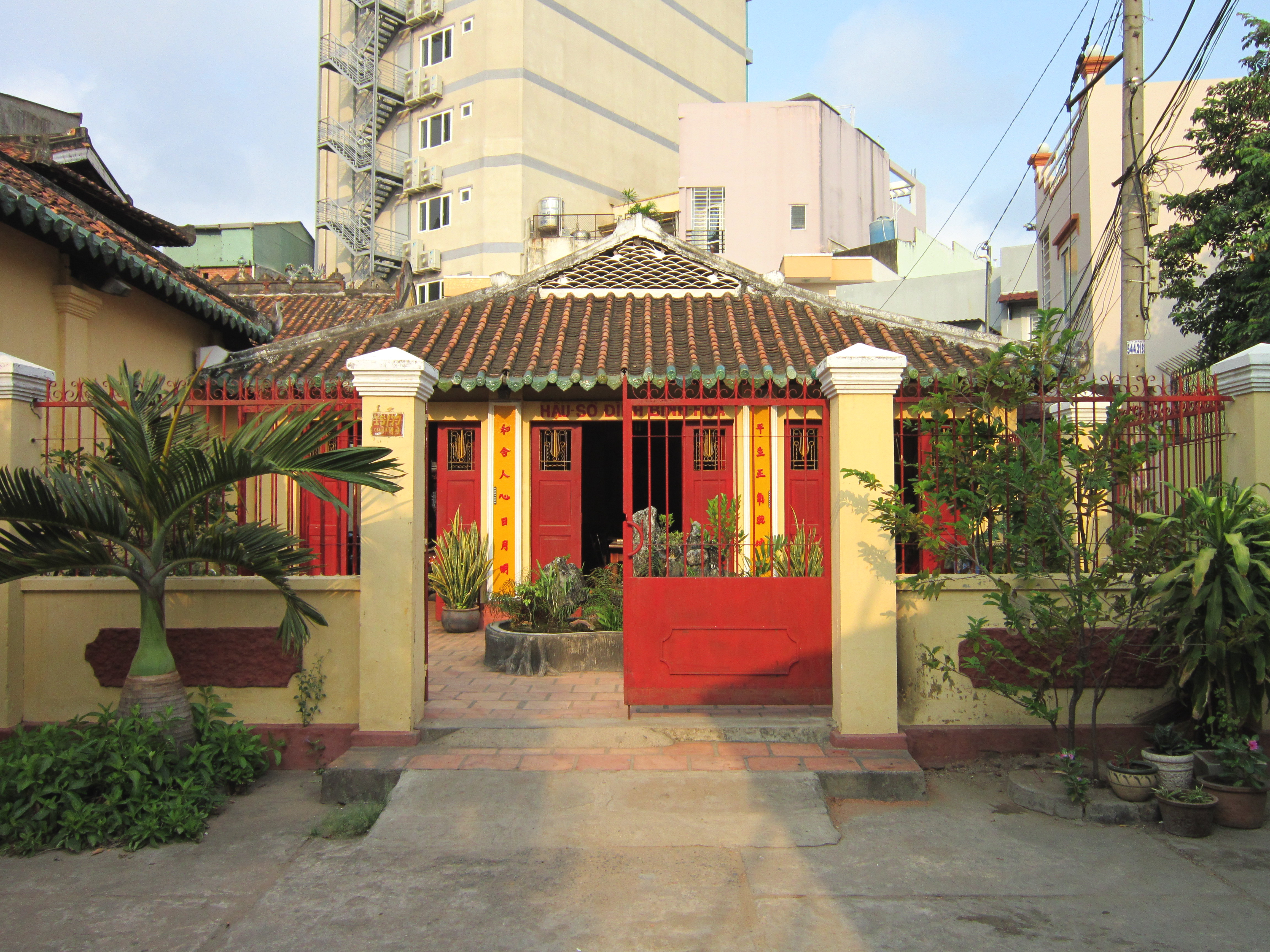 Công trình phụ kề bên chính điện đình Bình Hòa, hiện tọa lạc ở số 15/77 đường Chu Văn An, thuộc phường 12, quận Bình Thạnh, Thành phố Hồ Chí Minh, Việt Nam.